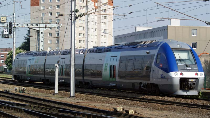 X76609-610 (Le Vimeu) partant d'Amiens